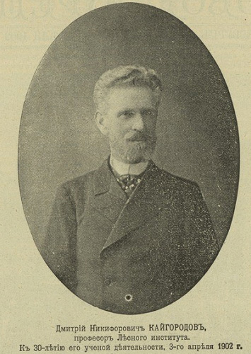 Кайгородов, Дмитрий Никифорович